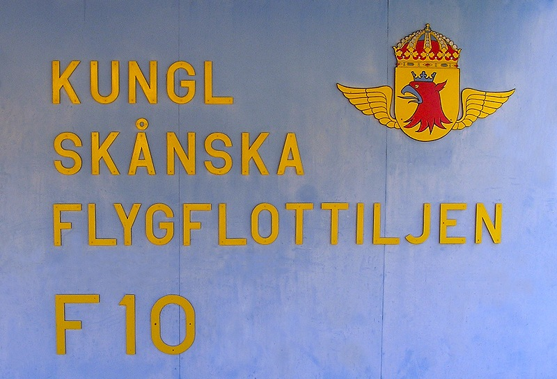 Skylten som tidigare var uppsatt vid F 10 flottiljvakt. Numera på Ängelholms flygmuseum. (Bilden lite retuscherad för att få bort ränder och "fingrar" på den blå bakgrunden.)